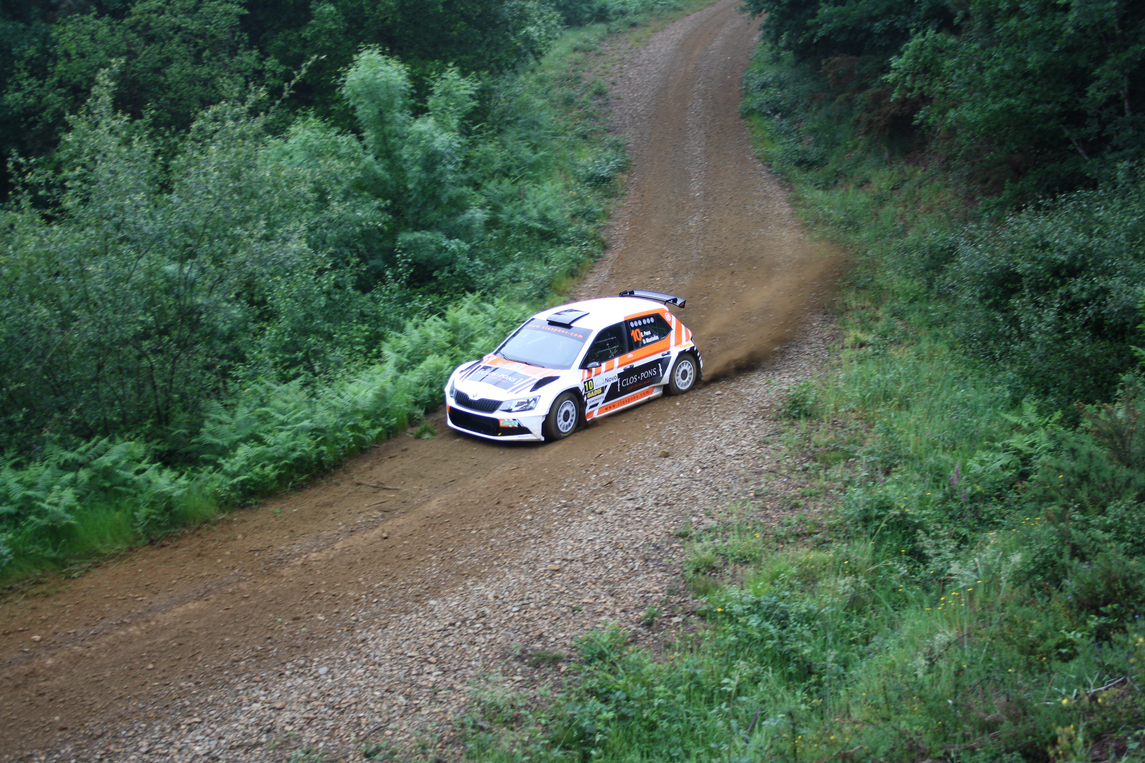 Rally Terra da Auga. Tercera prueba del campeonato de España de rallies de tierra 2018.